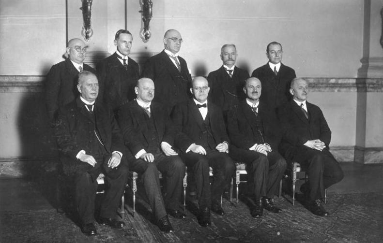 ADN-ZB/Archiv Die parlamentarische Reichsregierung: Drittes (viertes) Kabinett Marx, 29.1.1927 bis 12.6.1929 (Aufnahme vom 2. Februar 1927) Sitzend von links: Heinrich Brauns: Arbeit (Z.), Dr. Gustav Stresemann: Auswärtiges (D.Vp.), Dr. Wilhelm Marx: Kanzler und Besetzte Gebiete (Z.), Dr. Oskar Hergst: Vizekanzler und Justiz (Dnat.Vp.), Otto Geßler: Reichswehr (als Fachminister); stehend von links: Wilhelm Koch-(Düsseldorf) Verkehr (Dnat.Vp.), Walter von Keudell: Inn eres (Dnat.Vp.), Georg Schätzel: Post (Bayr. Vp.), Martin Schiele: Ernährung und Landwirtschaft (Dnat.Vp.), Dr. Julius Curtius: Wirtschaft (D.Vp.) Information added by Wikimedia users.Kabinett Marx IV 29. Januar 1927 – 29. Juni 1928